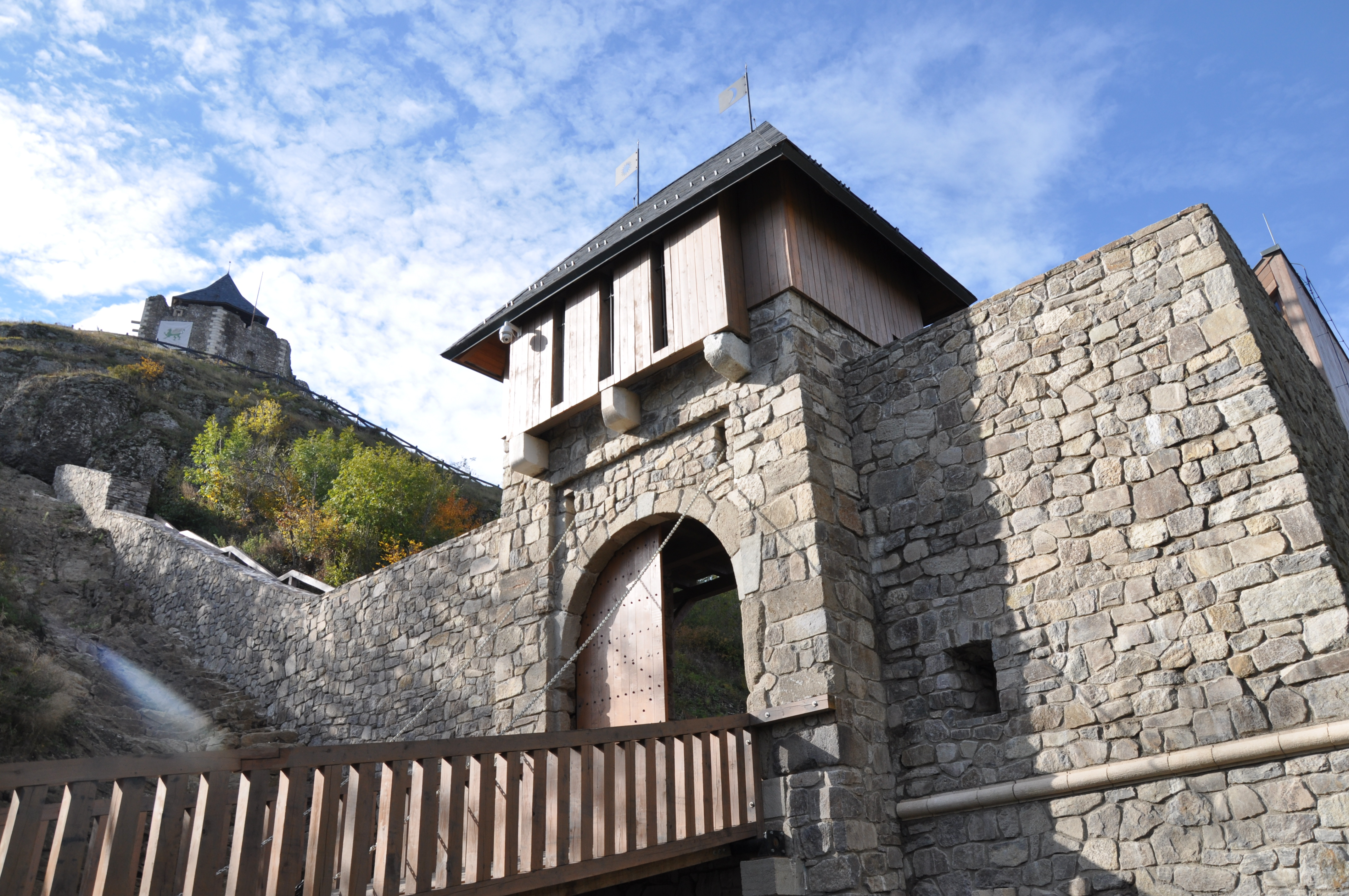 Az újjáépült Füzér vára, várkapu